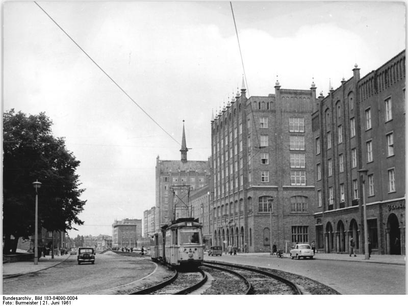 Rostock, Lange Straße, Straßenbahn Zentralbild Burmeister Hl-Qu 21.6.1961 Rsotock - die Stadt der 4. Ostseewoche 1961 UBz: Blick auf die Lange Strasse mit der dort neuverlegten Strassenbahn.